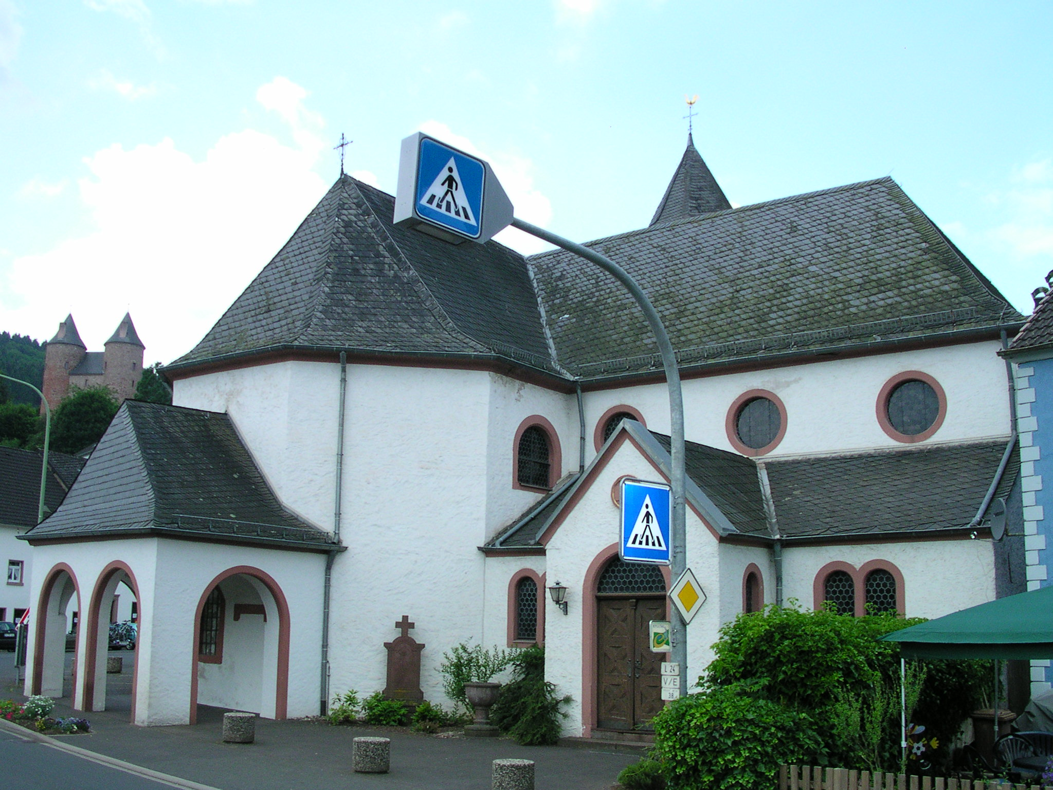 katholische Pfarrkirche St. Luzia in Mürlenbach, Landkreis Vulkaneifel